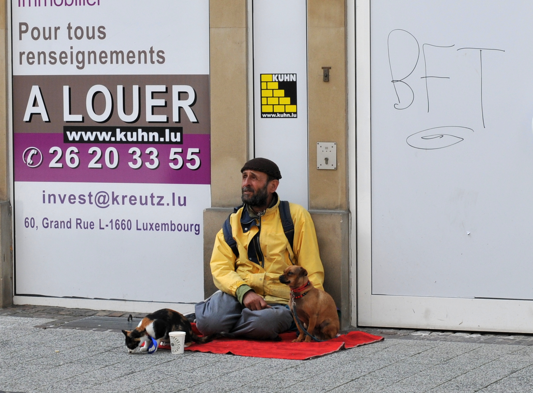 en Heeschemann an der Groussgaass.